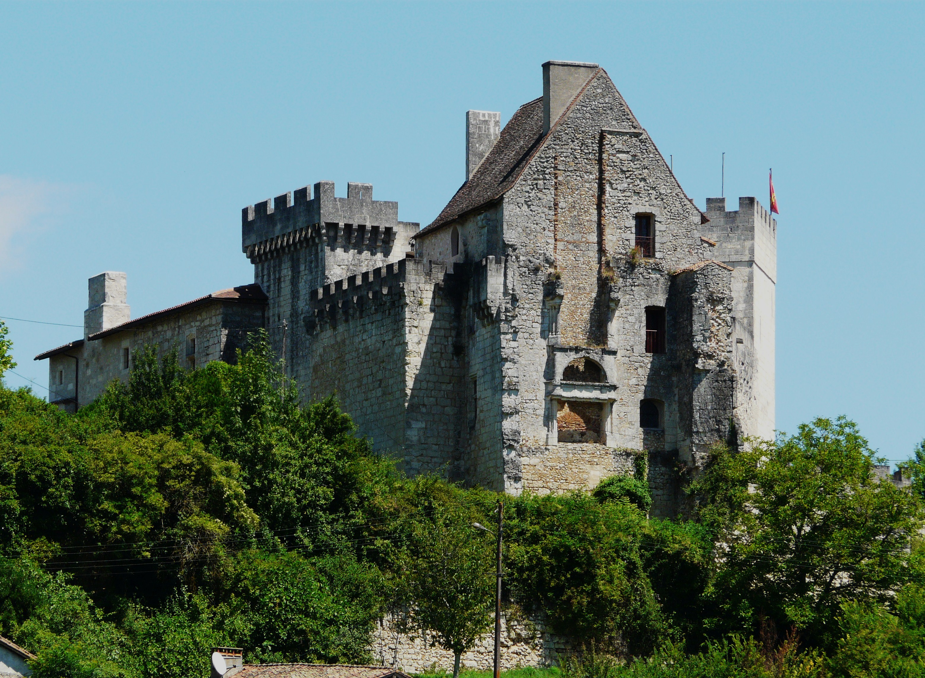 Le château de Grignols, Dordogne, France.